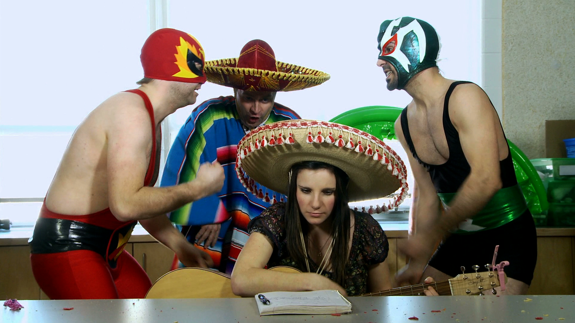 Image lors du tournage de l'émission JAM. Défi de Vanessa Thibodeau (Dubreuilville, Ontario) : écrire une chanson en cinq minutes sans être déconcentrée.